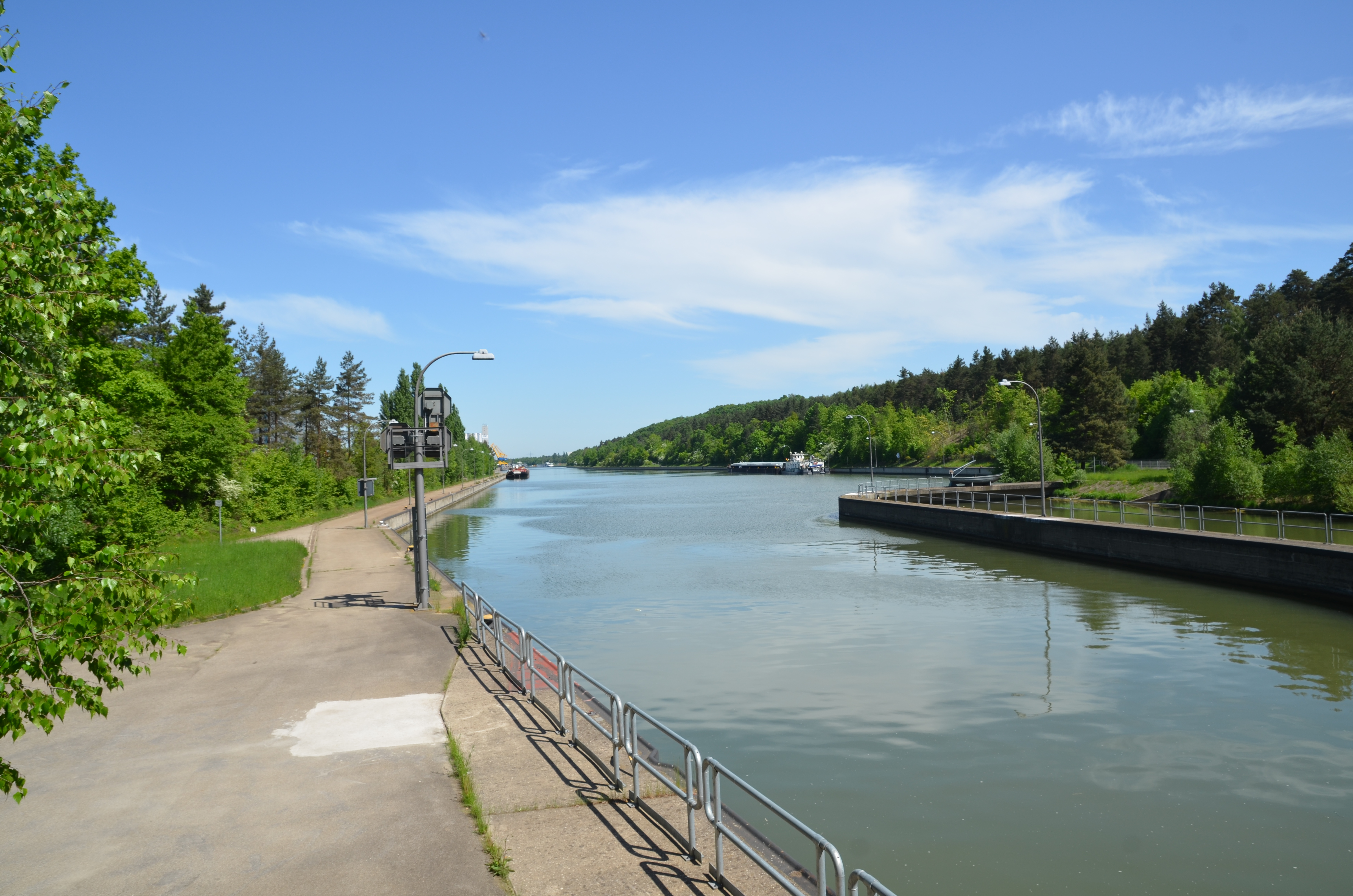 Hafen Nürnberg - Blick von der Eibacher Schleuse (2012)